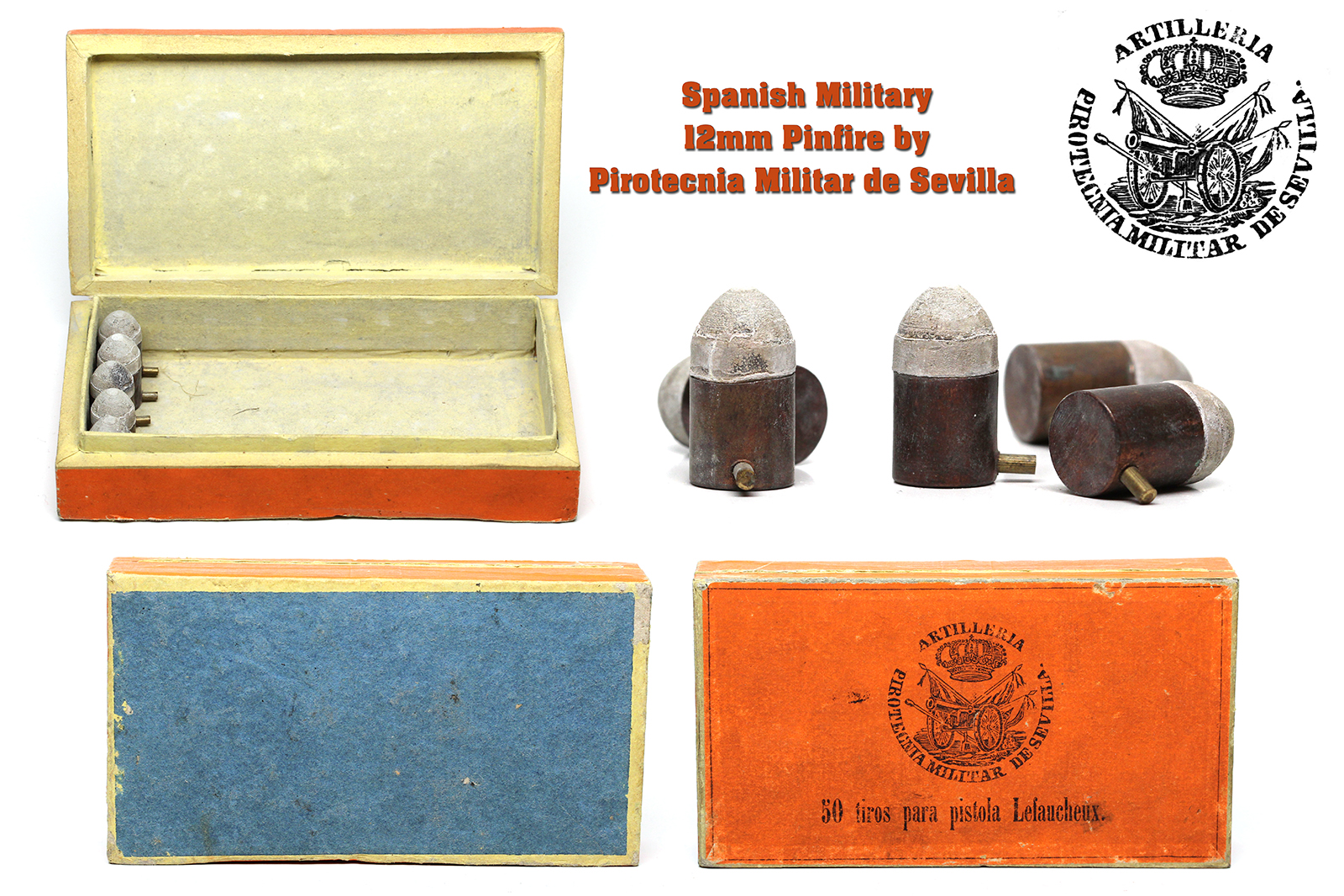 De 1860 a 1863, Pirotecnia militar de Sevilla va fer cartutx Lefaucheux.